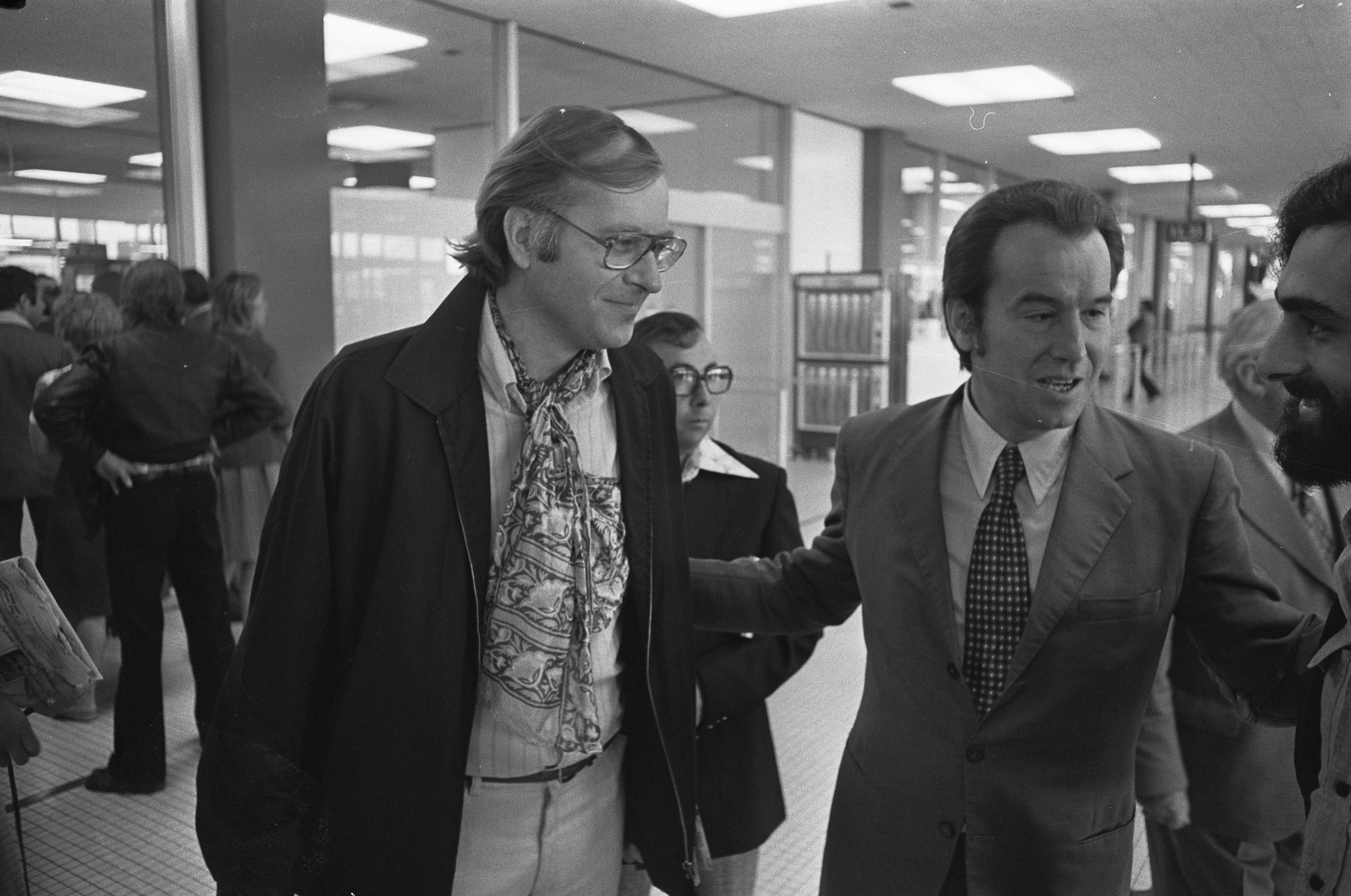 Leider Chileense radikale partij Anselmo Sule bij aankomst op Schiphol begroet door Huub Oosterhuis , voorzitter Chileense Beweging. 9 september 1975